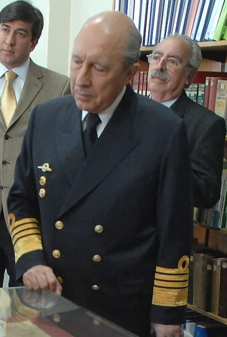 El actual almirante de la Armada Argentina, Jorge Godoy.